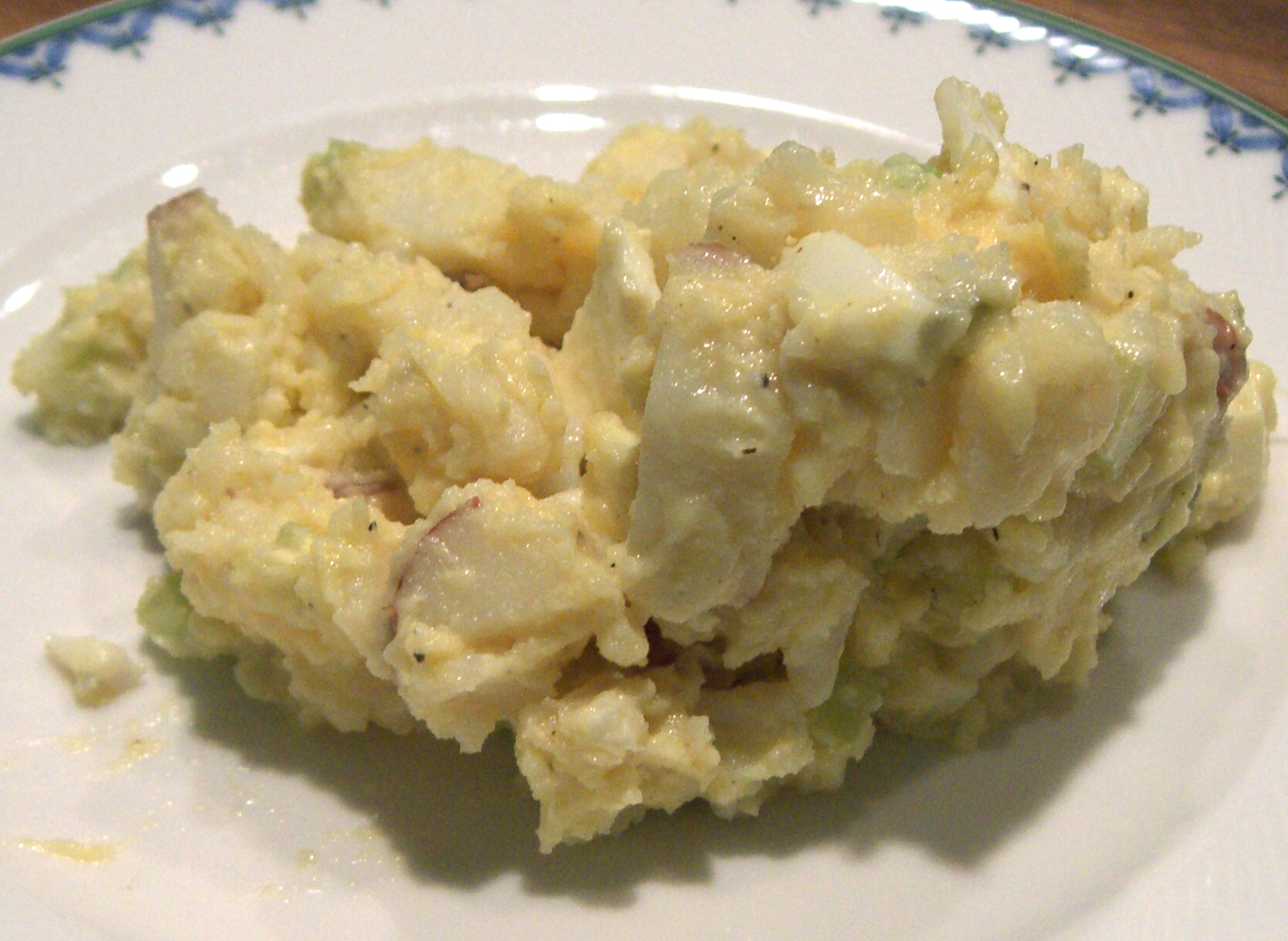 Potato salad with egg and mayonnaise